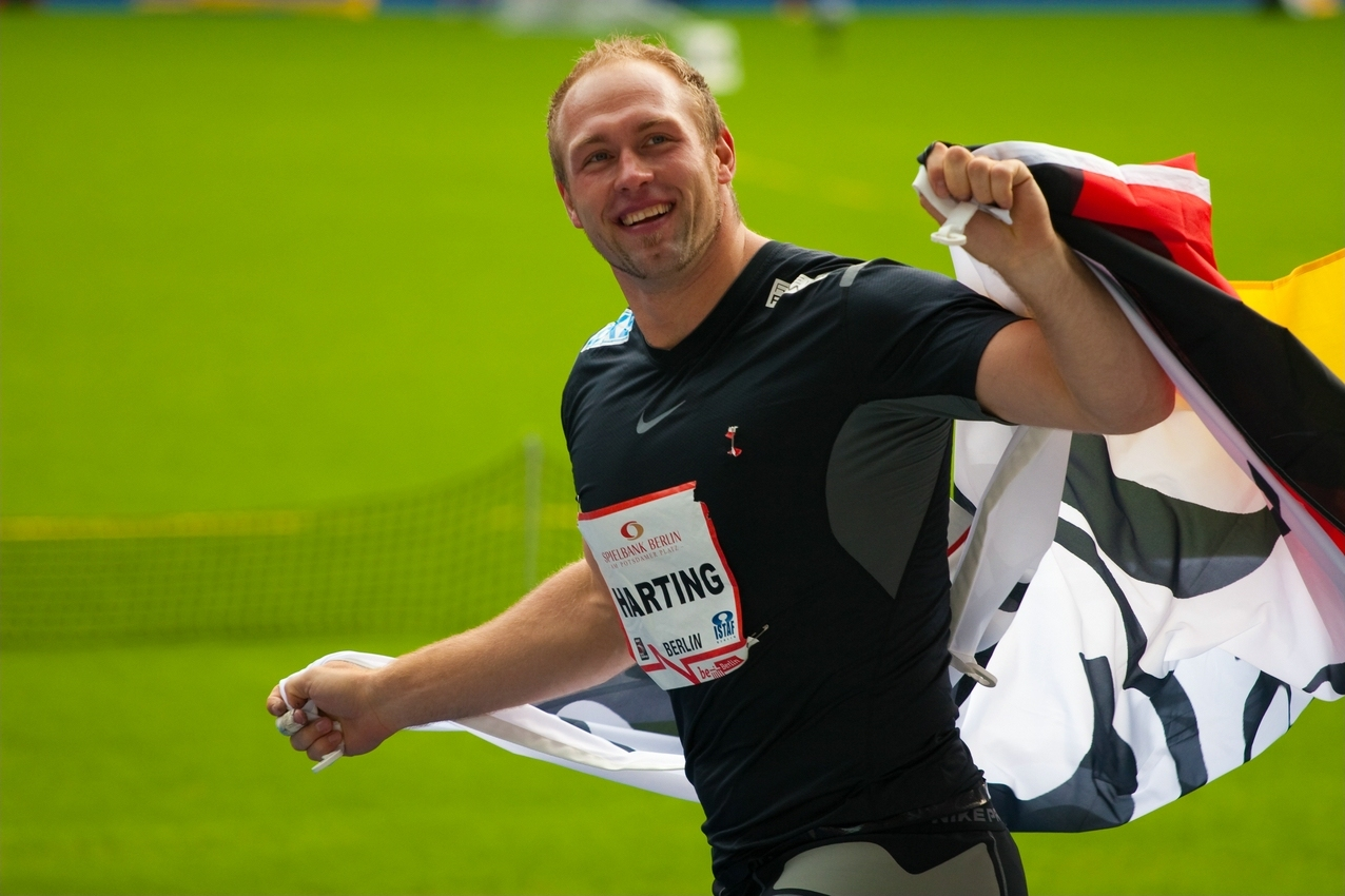 ISTAF Berlin 2012, Diskuswerfen: Robert Harting